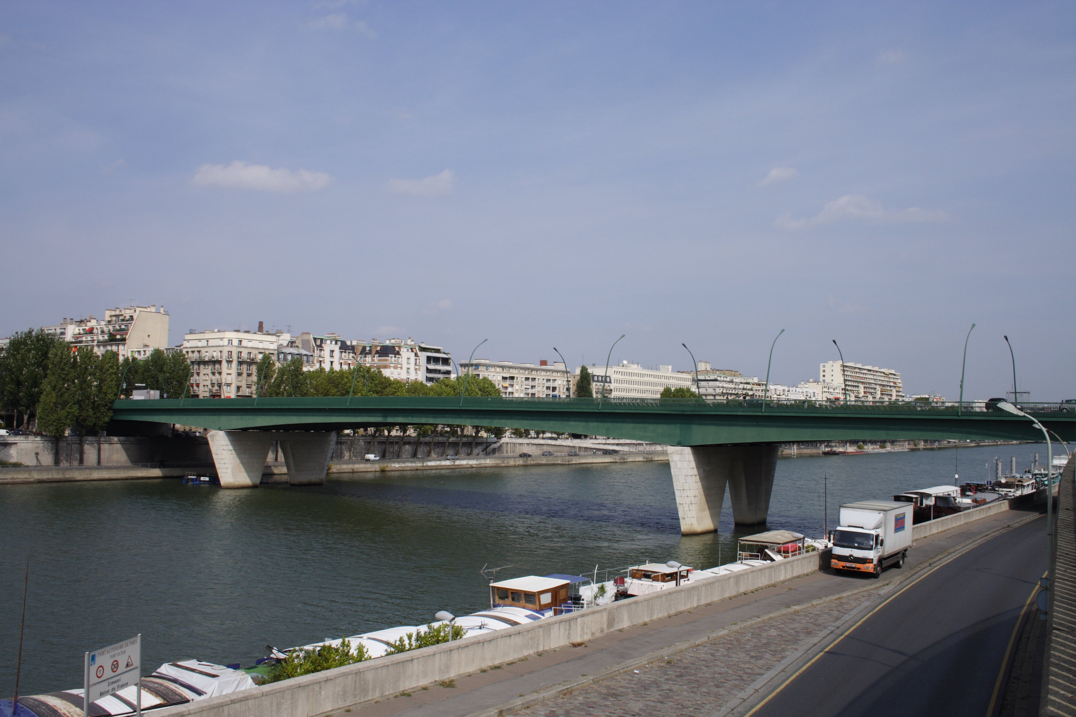 Pont du Garigliano(Paris, France)